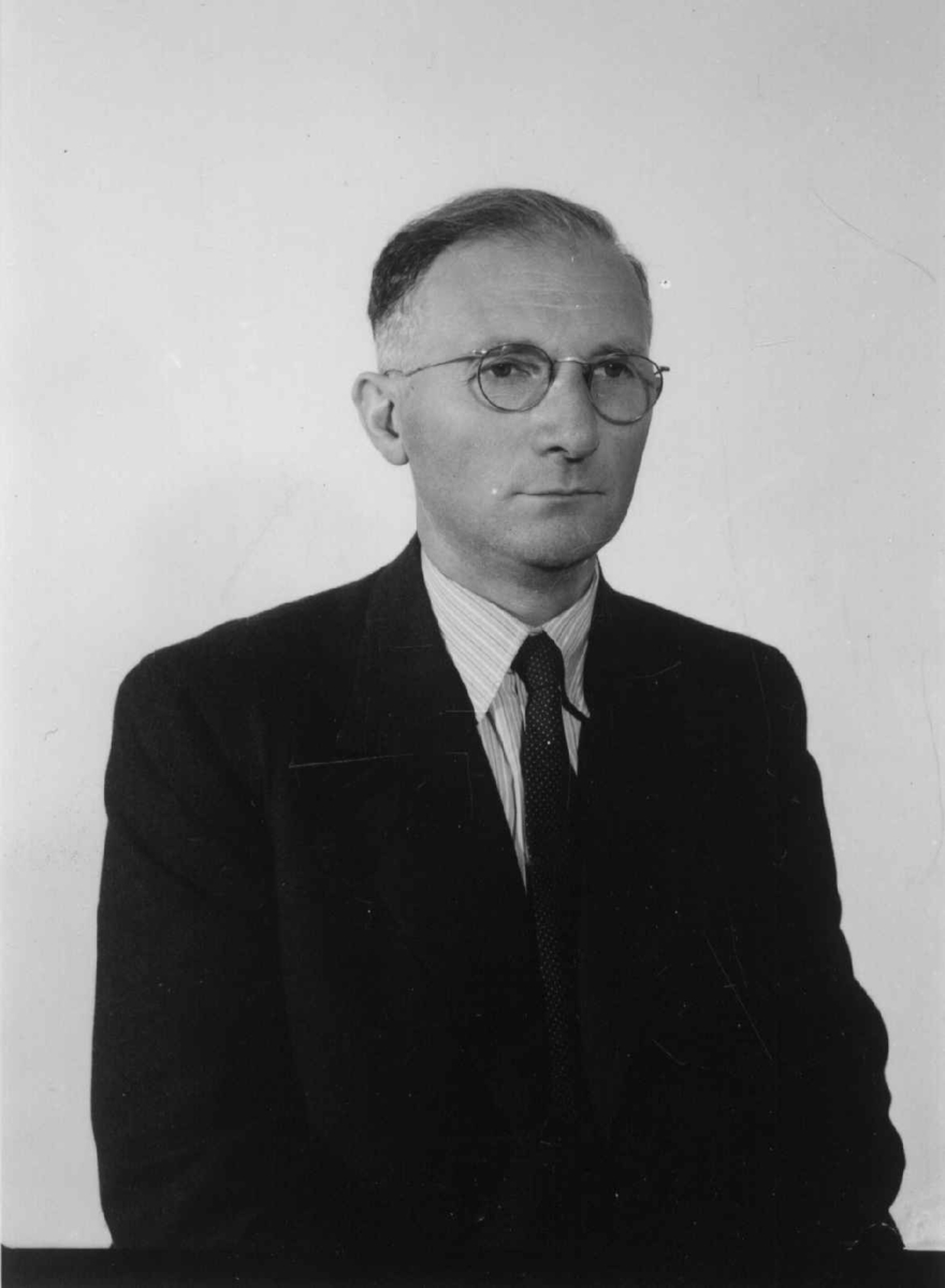 Portrett av Hilmar Stigum, 1955, foto Norsk Folkemuseum